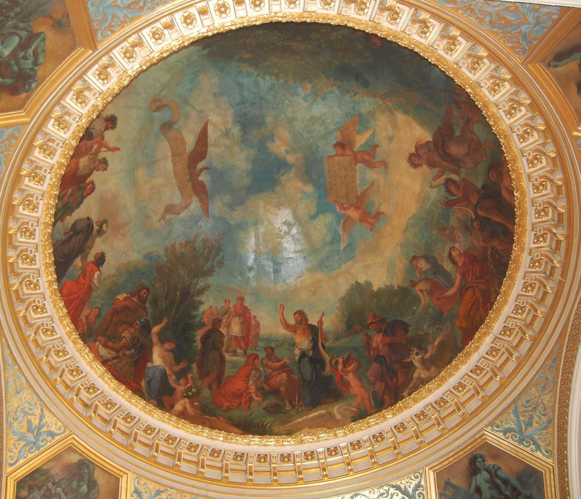 l'enfer de dante par delacroix, librairie du palais du luxembourg